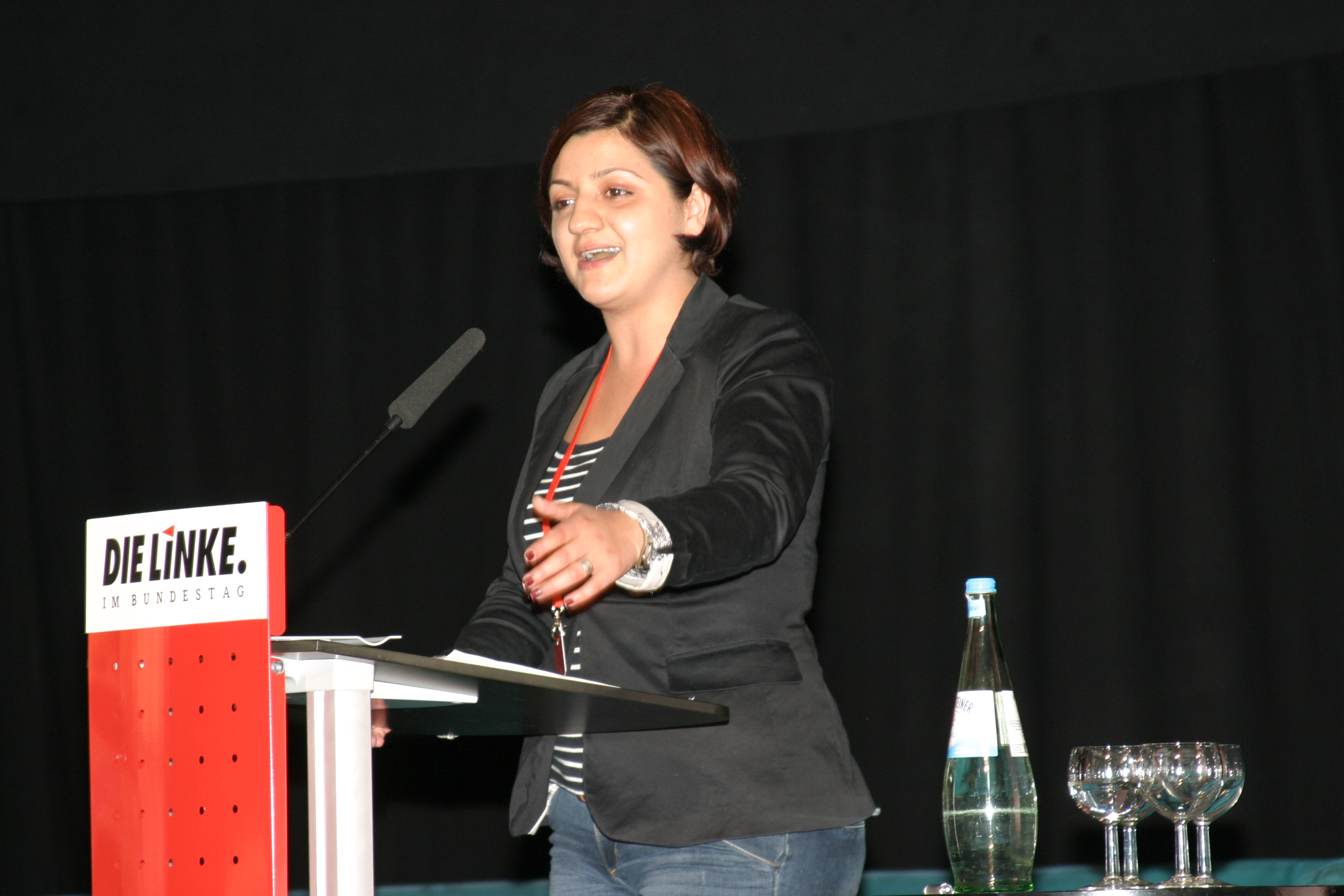 Özlem Alev Demirel, Mitglied der Fraktion DIE LINKE im Landtag Nordrhein-Westfalen